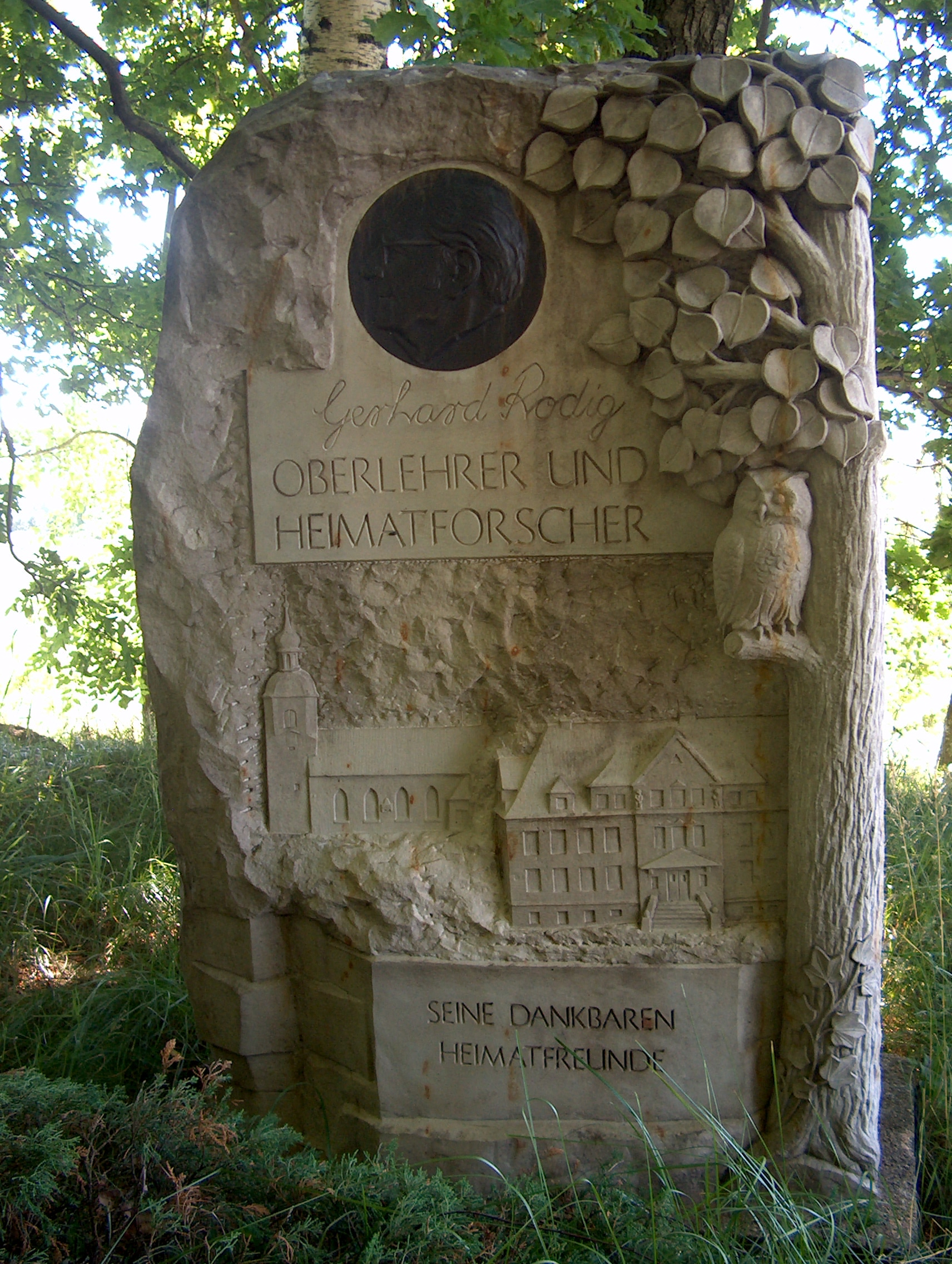 Ehrentafel für den Ortschronisten Gerhard Rodig